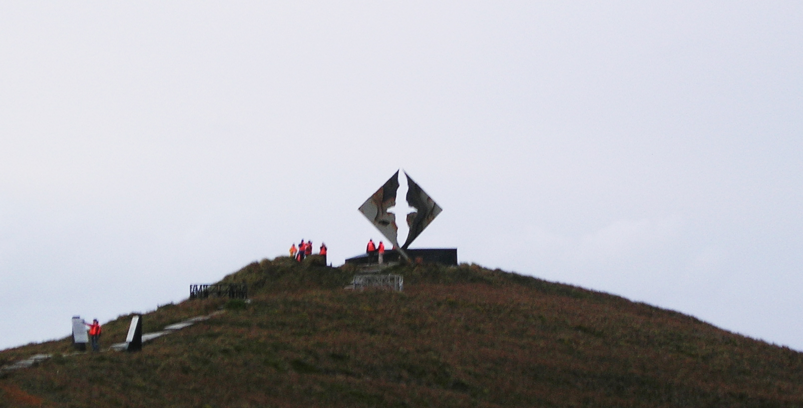 Monumento en el Cabo de Hornos en honor a todos los marinos fallecidos intentando cruzar esta ruta. Nombre: Albatros, Año de inauguración: 1994